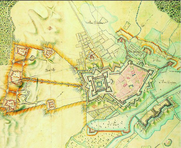 Größter französischer Ausbauplan für Jülich. Planzeichnung aus dem Jahr 1805.